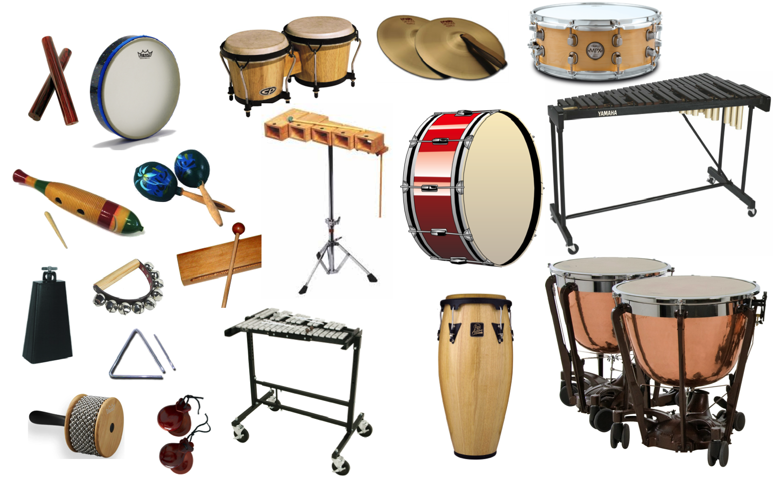 Varie percussioni su sfondo bianco.